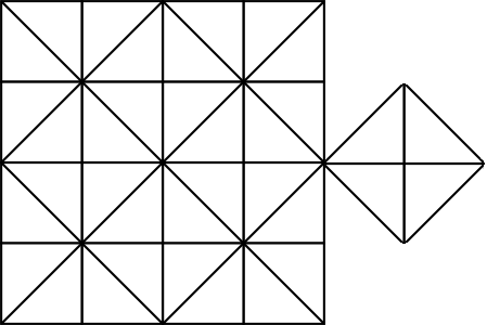 虎棋棋盤的一種。